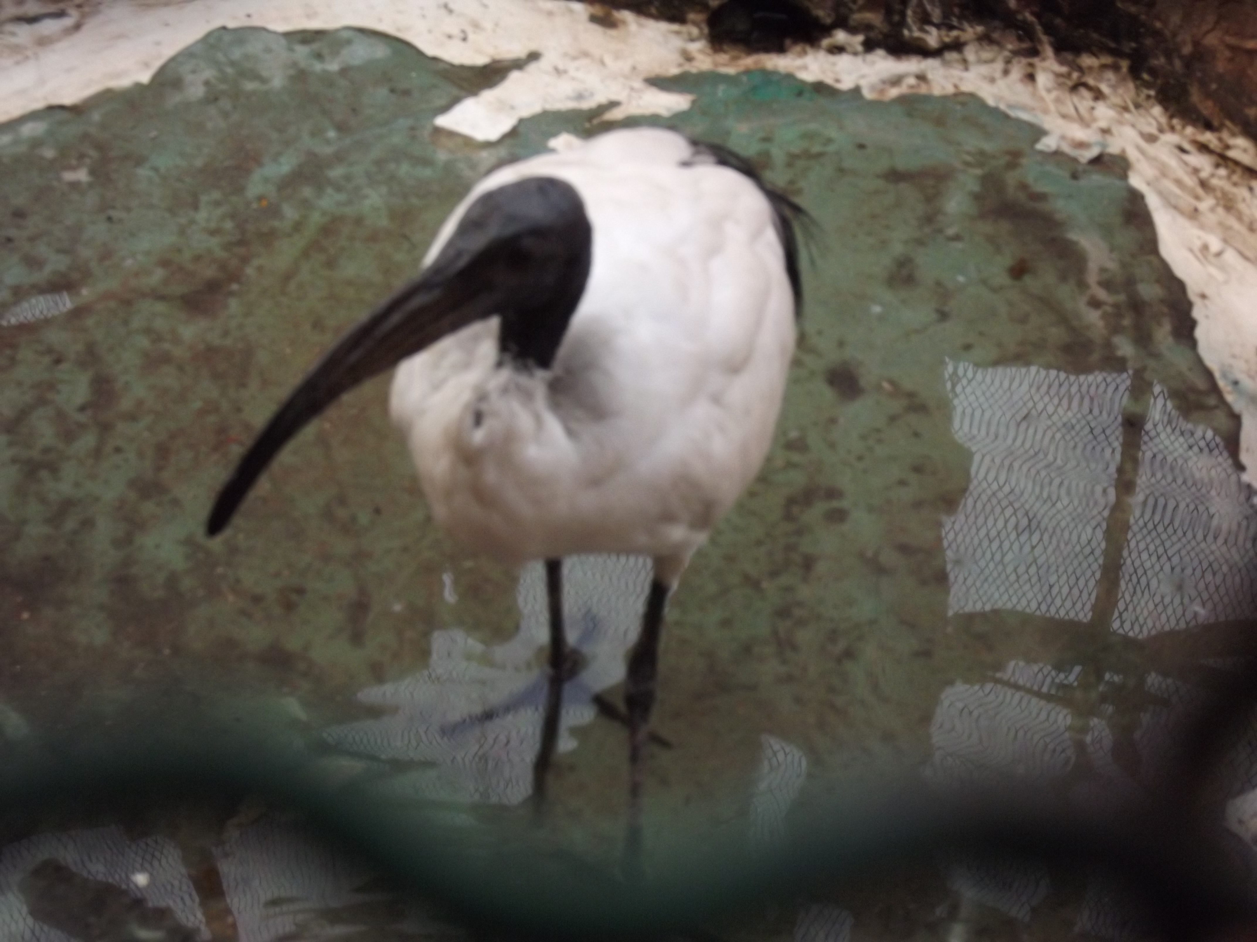 أبو منجل المقدس في حديقة حيوان النزهة - الاسكندرية